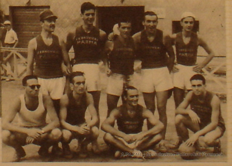 Ferrovieri Parma del prof. Renzo Del Chicca campione di Italia di pallavolo 1950